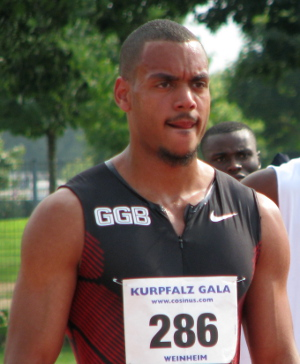 Rolf Malcolm Fongué beim DLV-Olympia-Testwettkampf 2012 im Sepp-Herberger-Stadion Weinheim.